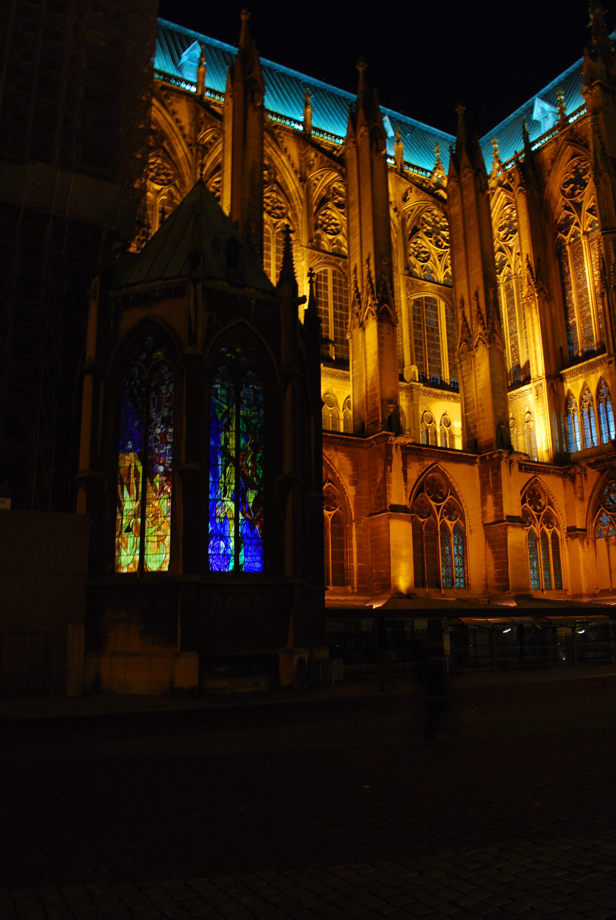 Vue d'extérieur des vitraux de Jacques Villon